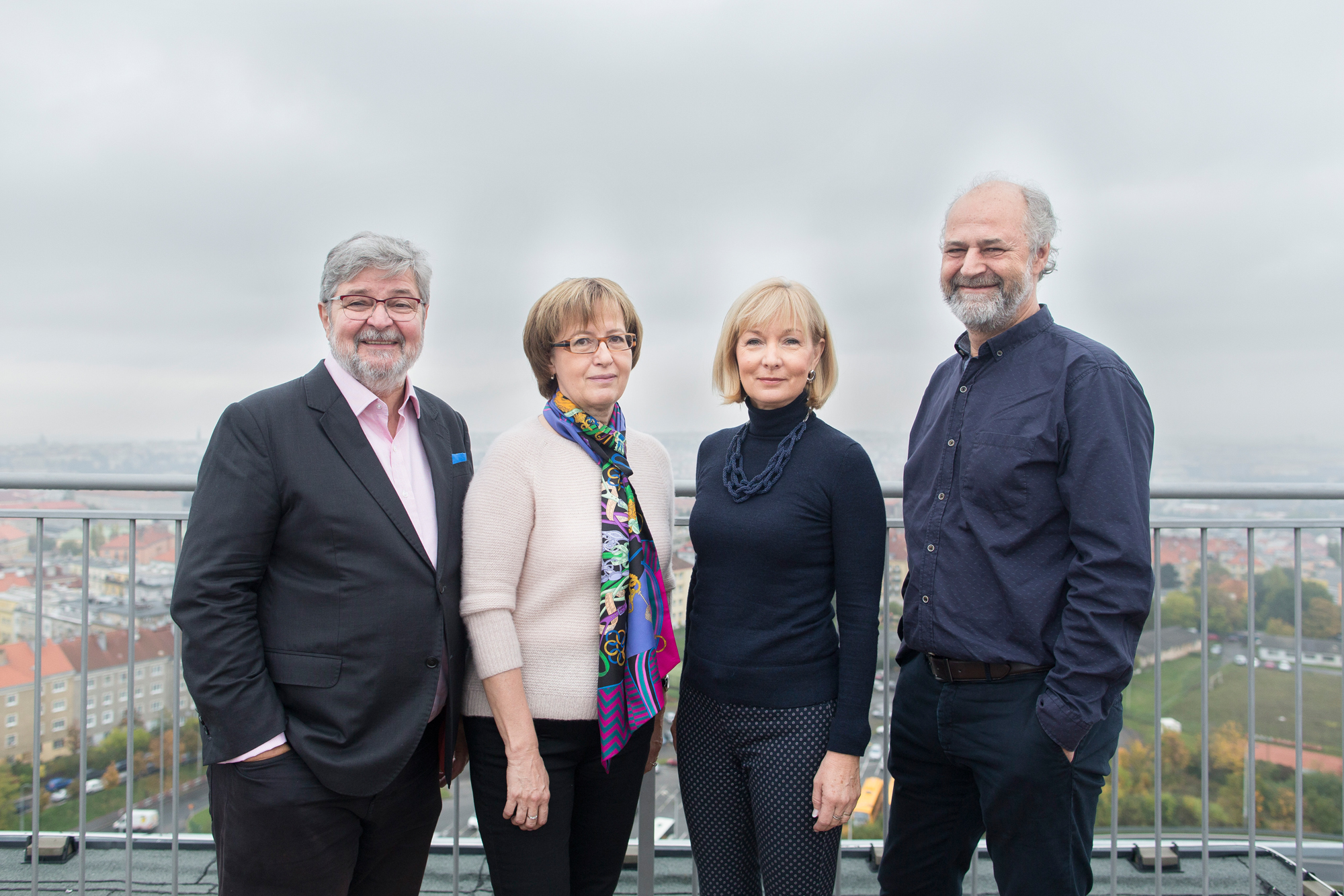 Eduard Kučera, Milada Kučerová, Jarmila Baudišová, Pavel Baudiš, foto Milan Bureš